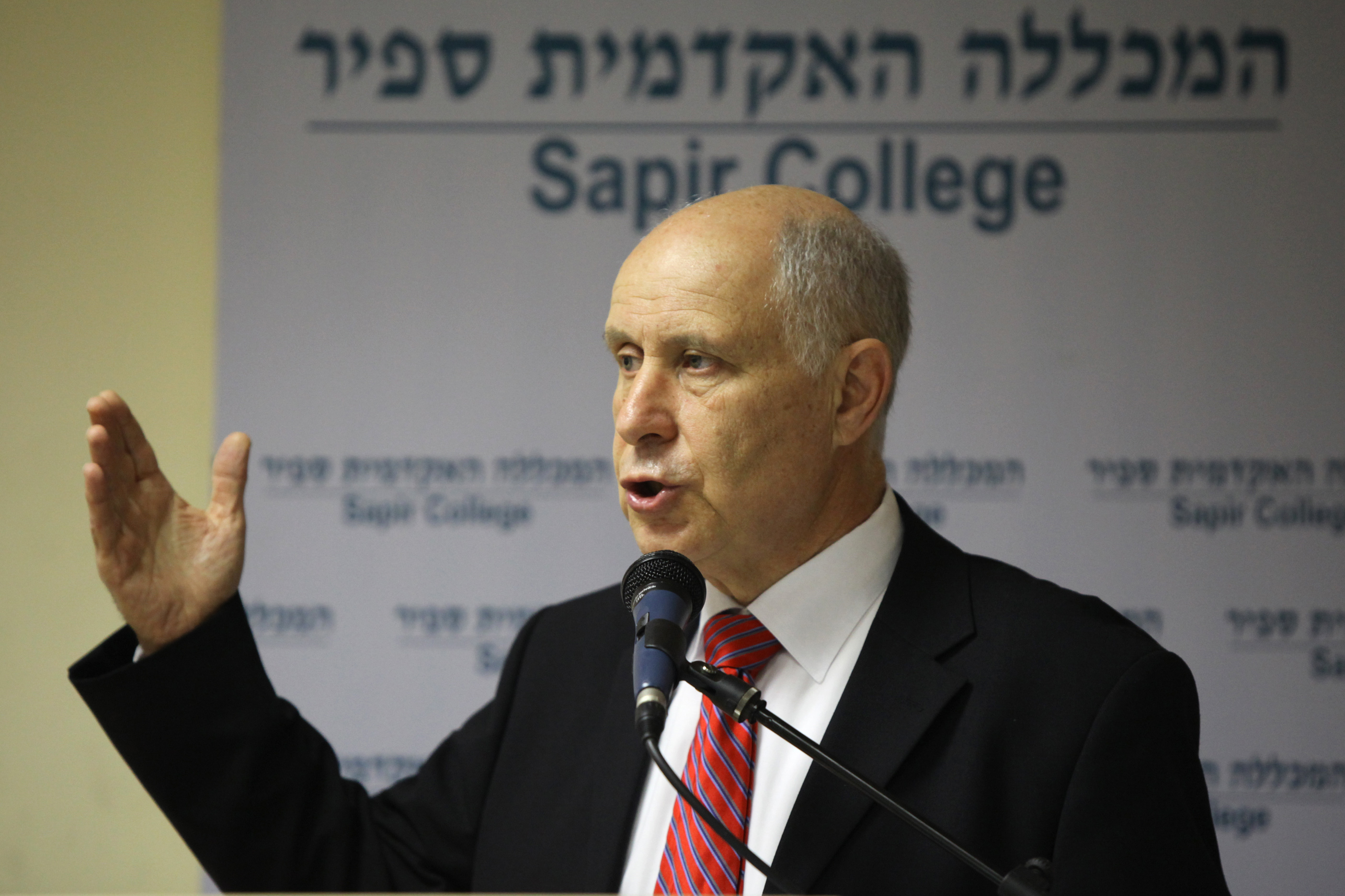 כנס שדרות לחברה במכללה האקדמית ספיר ובעיר שדרות 2015